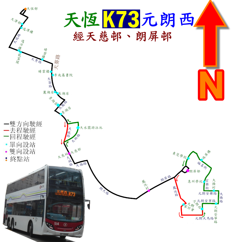 中文（香港）: 港鐵巴士K73線的地圖式路線圖